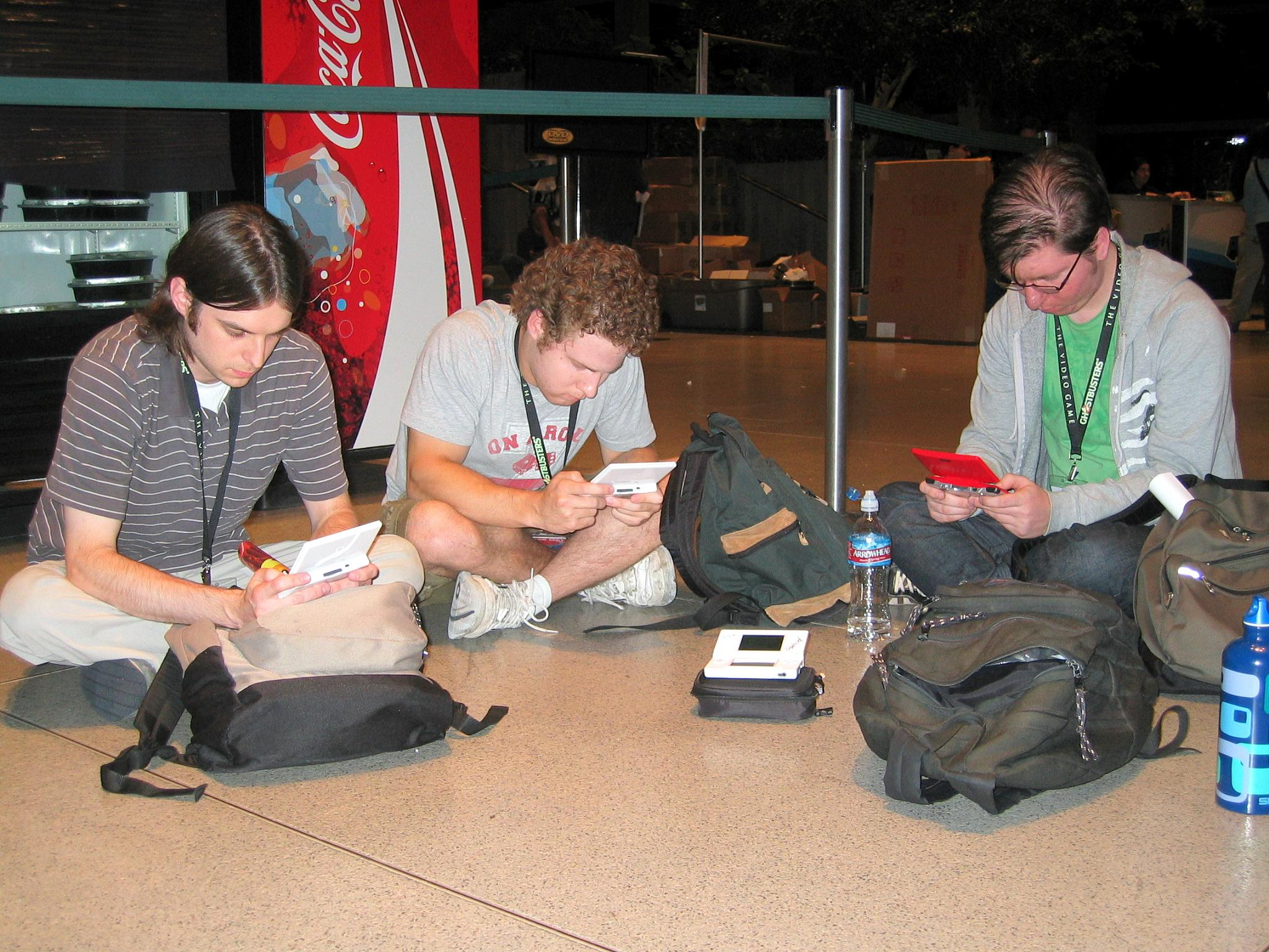 PAX 015